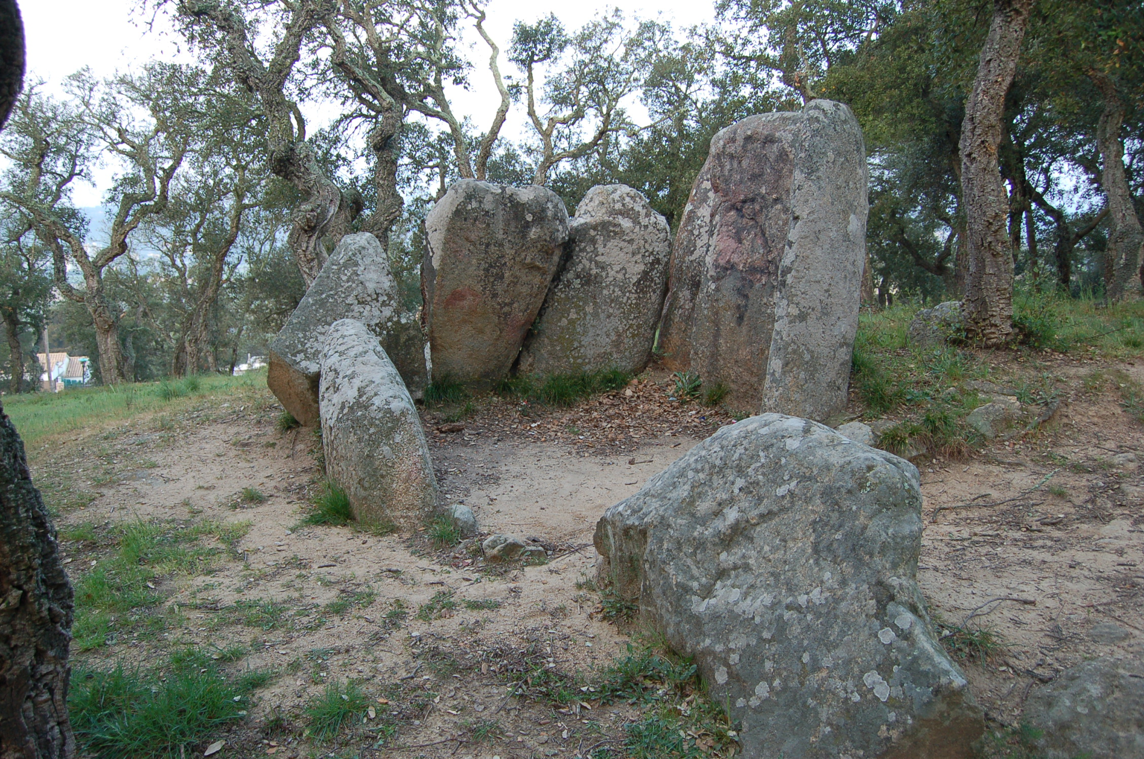 Dòlmen de Puig Ses Forques a Sant Antoni de Calonge